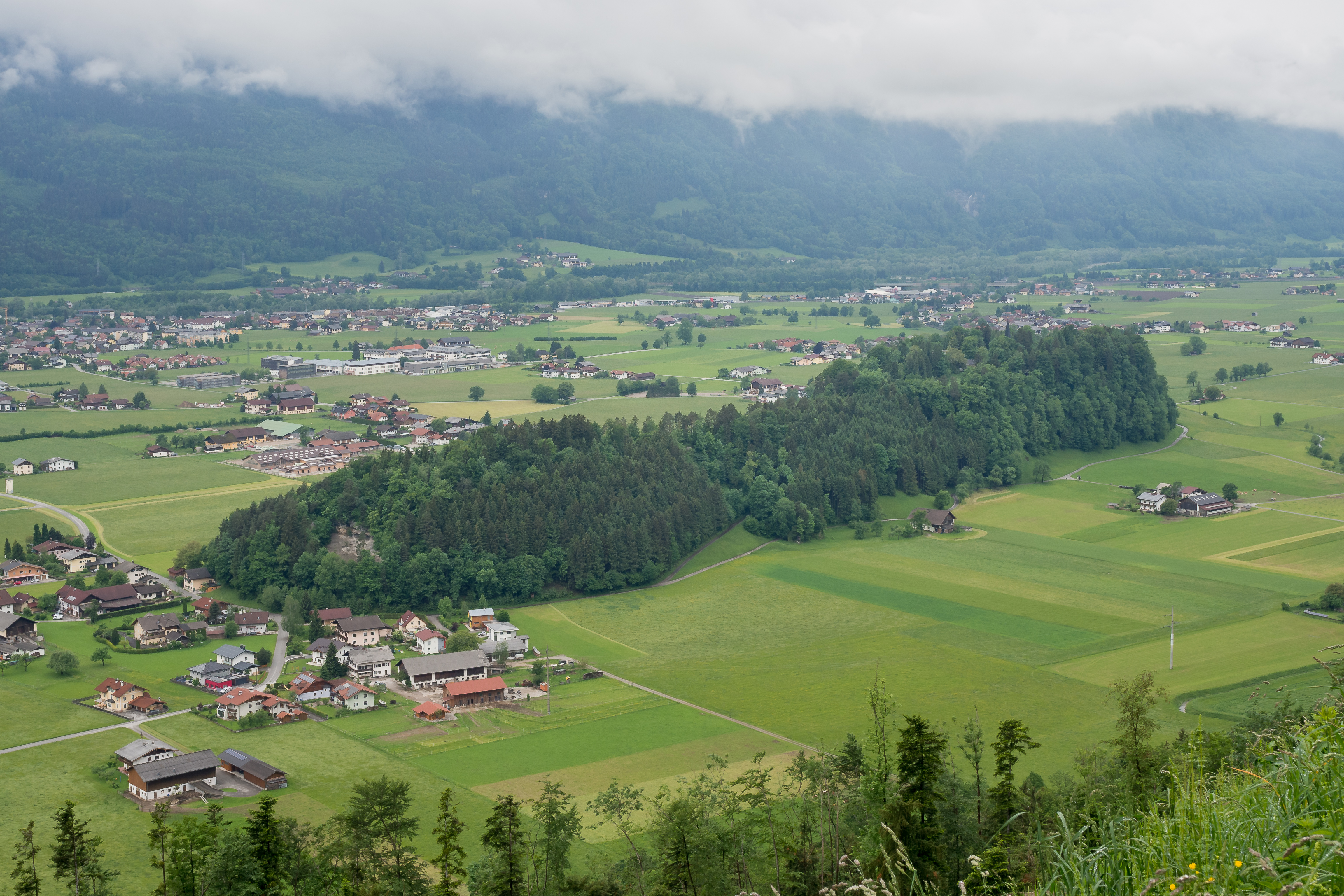 Blick von Koloman auf den Georgenberg This media shows the natural monument in Salzburg with the ID NDM00066.